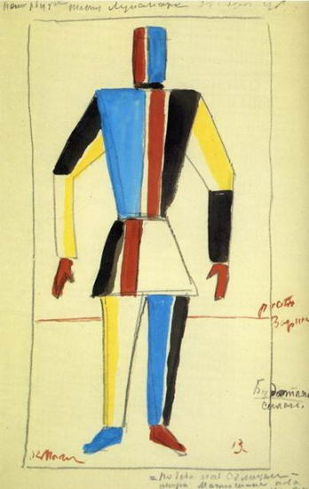 Набросок костюма к опере "Победа над солнцем" М. Матюшина. Атлет будущего. 1913 г., бумага, акварель, карандаш 53.3 x 36.1 см., Русский музей, С-Петербург, Россия